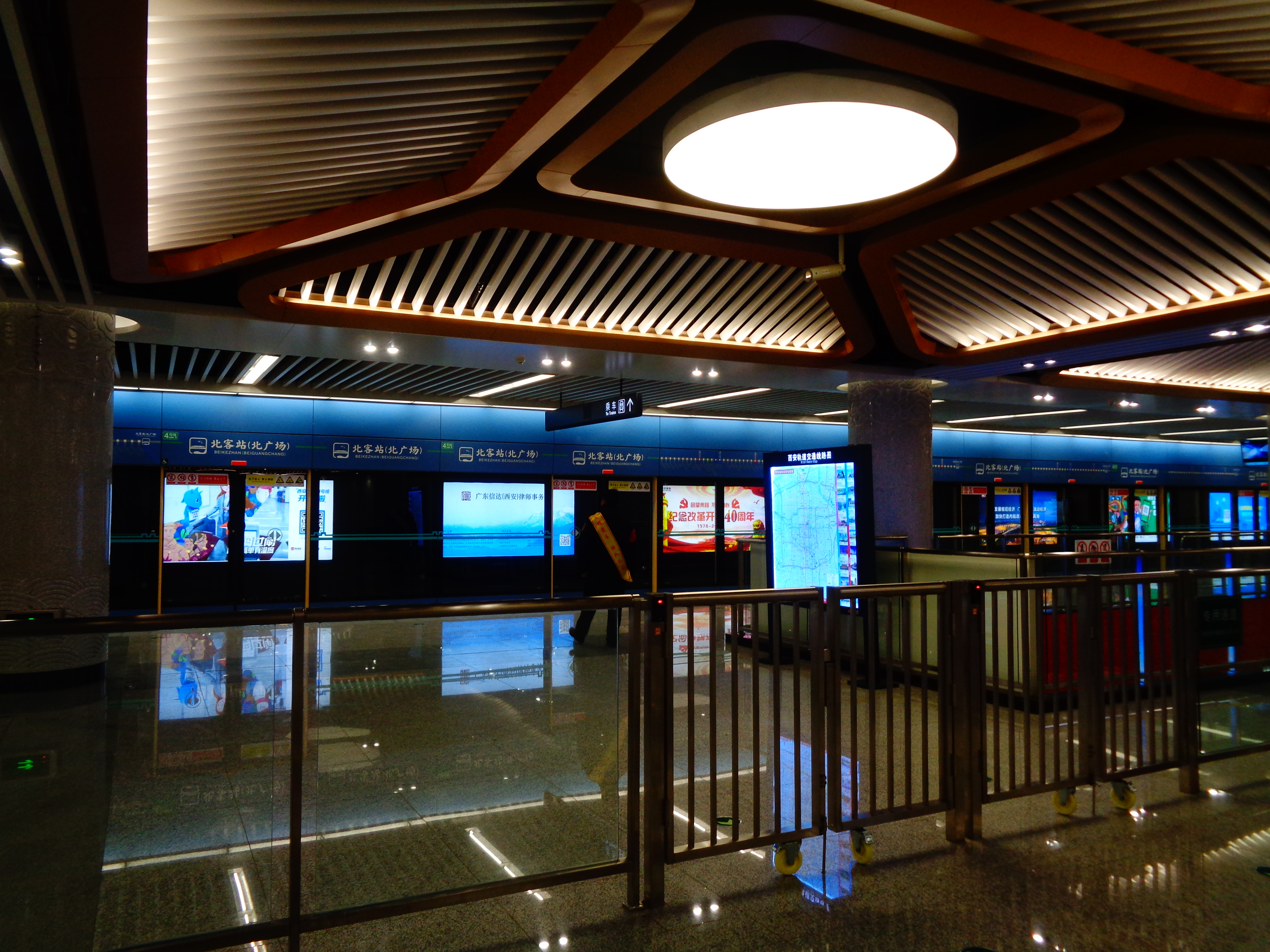 西安地铁四号线北客站（北广场）站，包括了地下一层和地下二层。地下一层有西安地铁四号线上行（北客站（北广场）站方向）下行（航天新城站方向）两线，为侧式站台。其中上行线先可以直接在地下一层出站前往北客站，但不可在地下一层进站，也可以下到地下二层，在地下二层出站，再进入西安北站地下一层南北式走廊，而下行线只可以在地下二层出入站。（ps：下行线的站台有一半被隔离板隔离开来了，估计是可以同台换乘机场线）需要注意的是，四号线的北客站（北广场）站与二号线的北客站站并不互联，可以说是两个距离相近的地铁站，在这两个站之间换成需要出站且要行走一段距离。